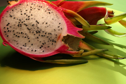 Halbierte Pitahaya mit Sicht auf das markante Fruchtfleisch